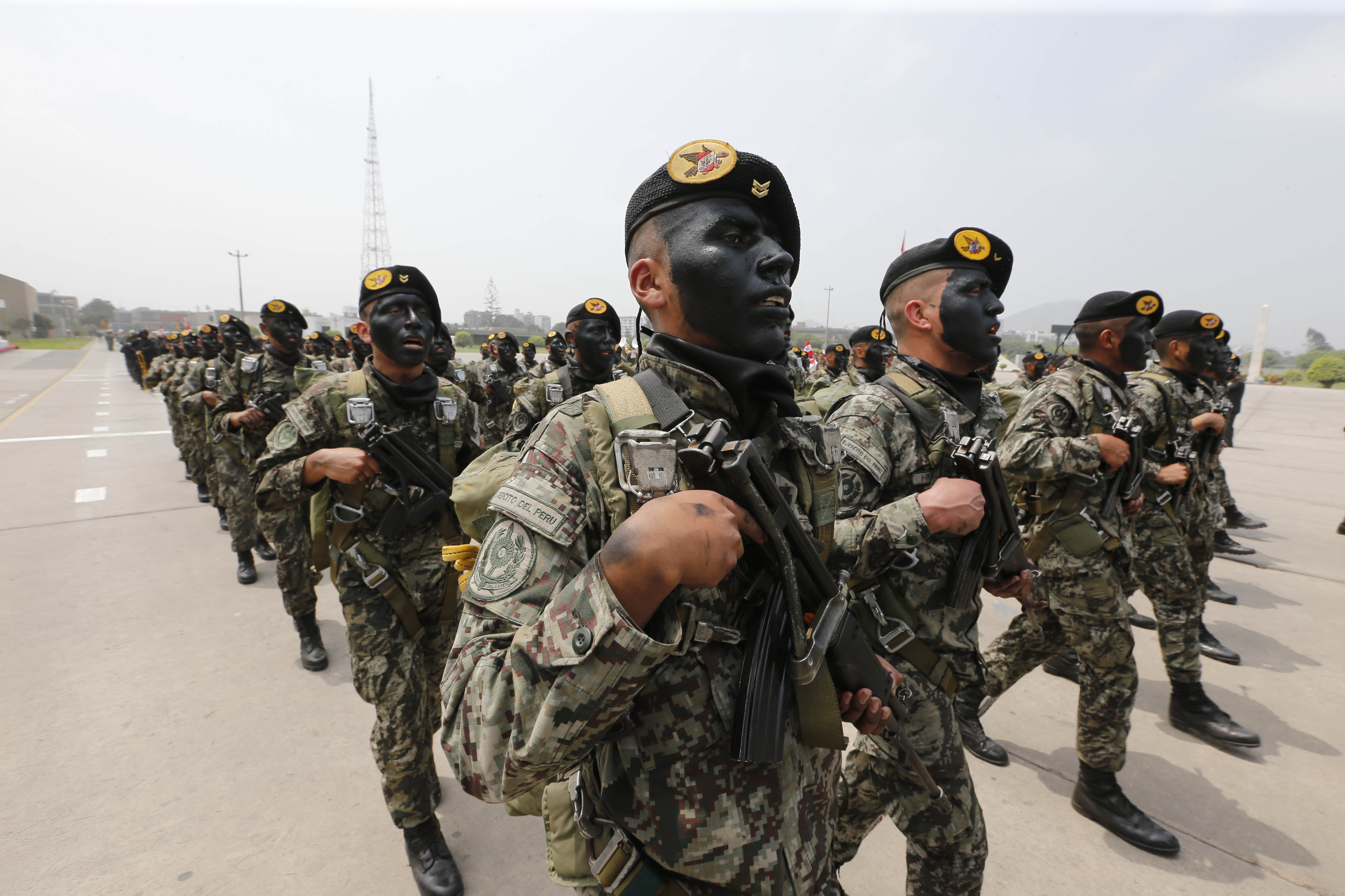 El ministro de Defensa, Jakke Valakivi presidió en la Plaza Cáceres del Cuartel General del Ejército la ceremonia de despedida del General del Ejército, Ronald Hurtado Jiménez, Comandante General del Ejército, quien dejó el cargo después de diecisiete meses de dirigir la institución. Valakivi hizo reconocer al General del Ejército, Carlos Vergara Ciapciak, como nuevo Comandante General del Ejército, quien tomó posesión del cargo y fue reconocido por la alta oficialidad del Ejército. La ceremonia contó con la presencia del alto mando del Comando Conjunto de las Fuerzas Armadas, la Marina de Guerra, la Fuerza Aérea y Policía Nacional, además de autoridades civiles Jesús María, 01 de setiembre de 2015 Oficina de Prensa Ministerio De Defensa